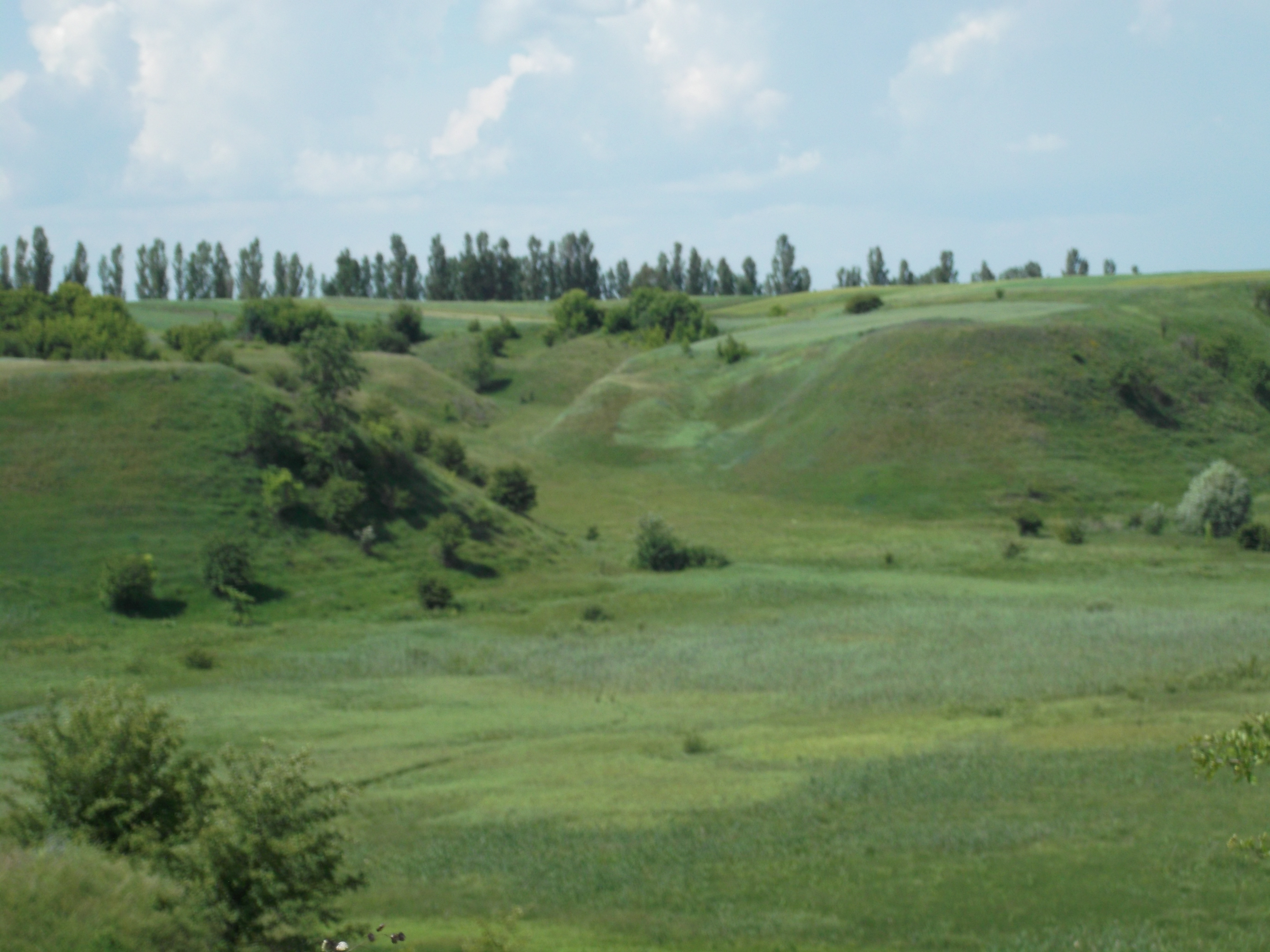 Село Понебель, Рівненський район, Україна. Брикальова долина, Підгори.